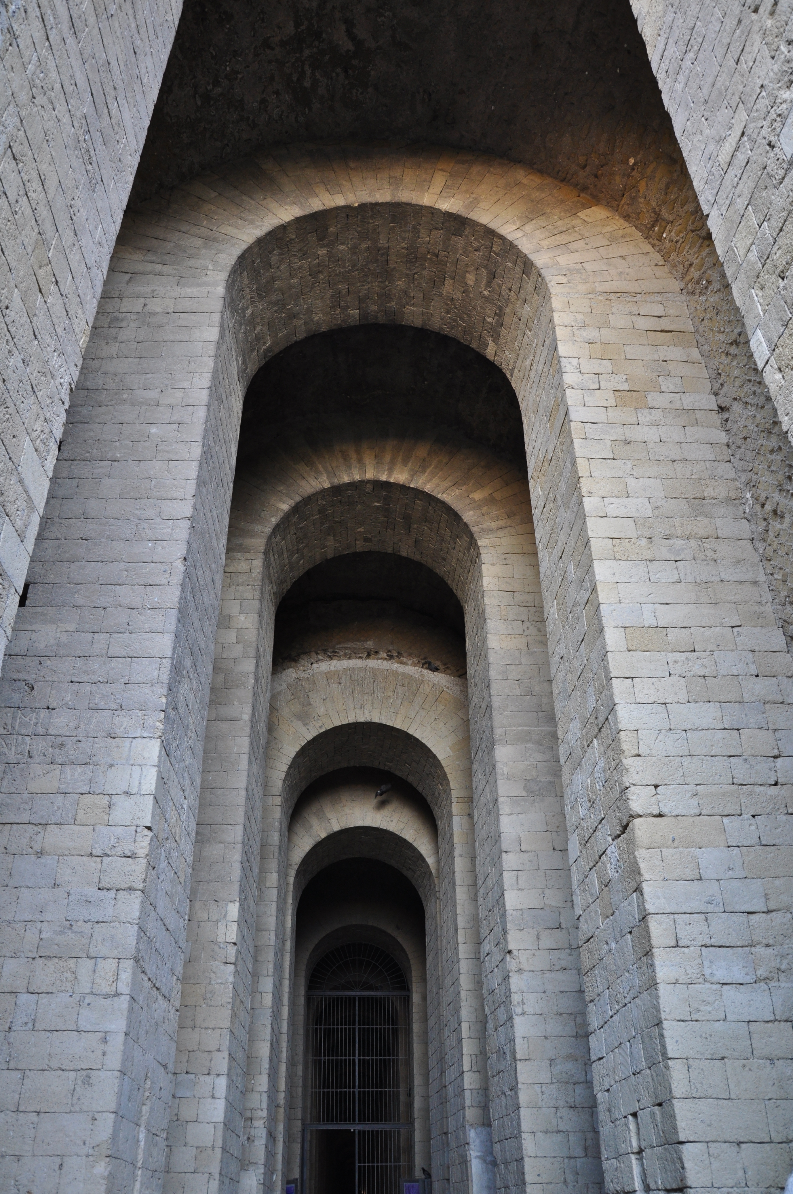 Napoli - Parco archeologico del Pausilypon